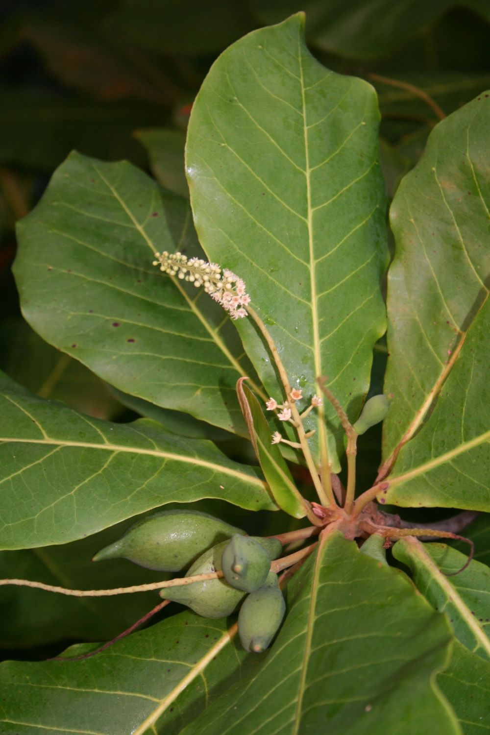 Terminalia catappa, Combretaceae - Costa Rica: Prov. Puntarenas, Hacienda Barú NW Dominical